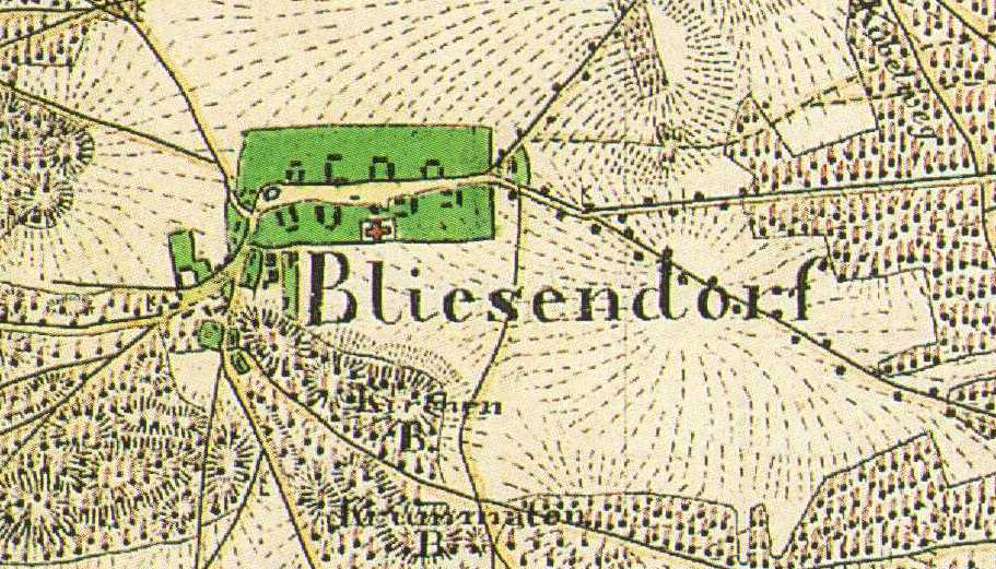 Bliesendorf, Ortsteil der Stadt Werder (Havel), Lkr. Potsdam-Mittelmark, Brandenburg,auf dem Urmesstischblatt 3643 Werder von 1839